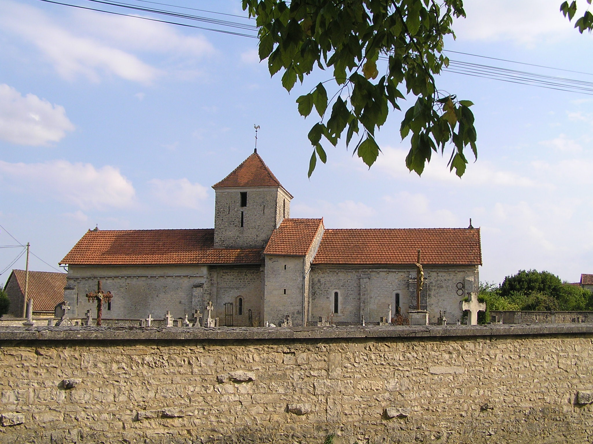 église de la Faye (ancien prieuré, Saint-Vincent), Charente, France